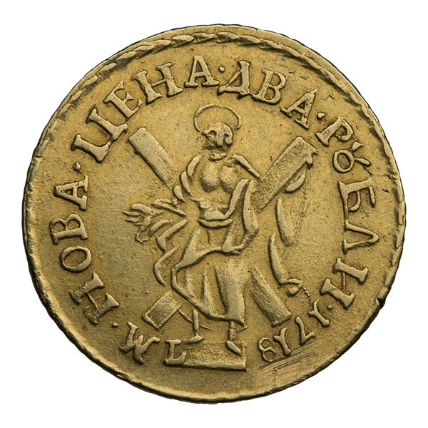 Два рубля 1718 г. (реверс). ГМ LXXXVII.7; Биткин 68 (R). Фигура св. Андрея Первозванного перед косым крестом; над головой нимб. Знак минцмейстера И. Ланга (1707—1719) — L. Дата справа. Круговая надпись: М[ОНЕТА] ∙ НОВА ∙ ЦЕНА ∙ ДВА ∙ РꙊБЛИ ∙ 1718